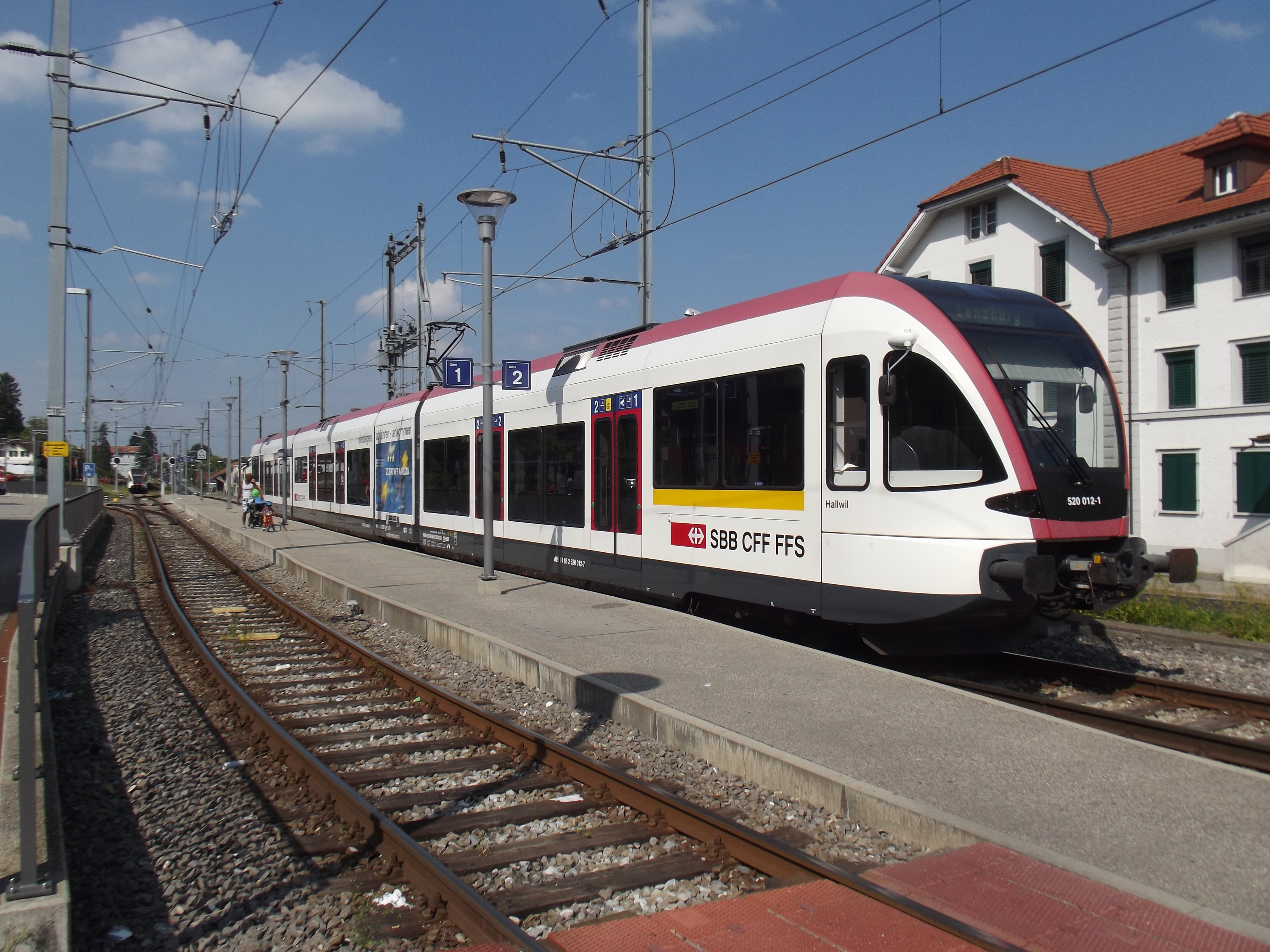 Trein van de Seetalbahn bij het station.